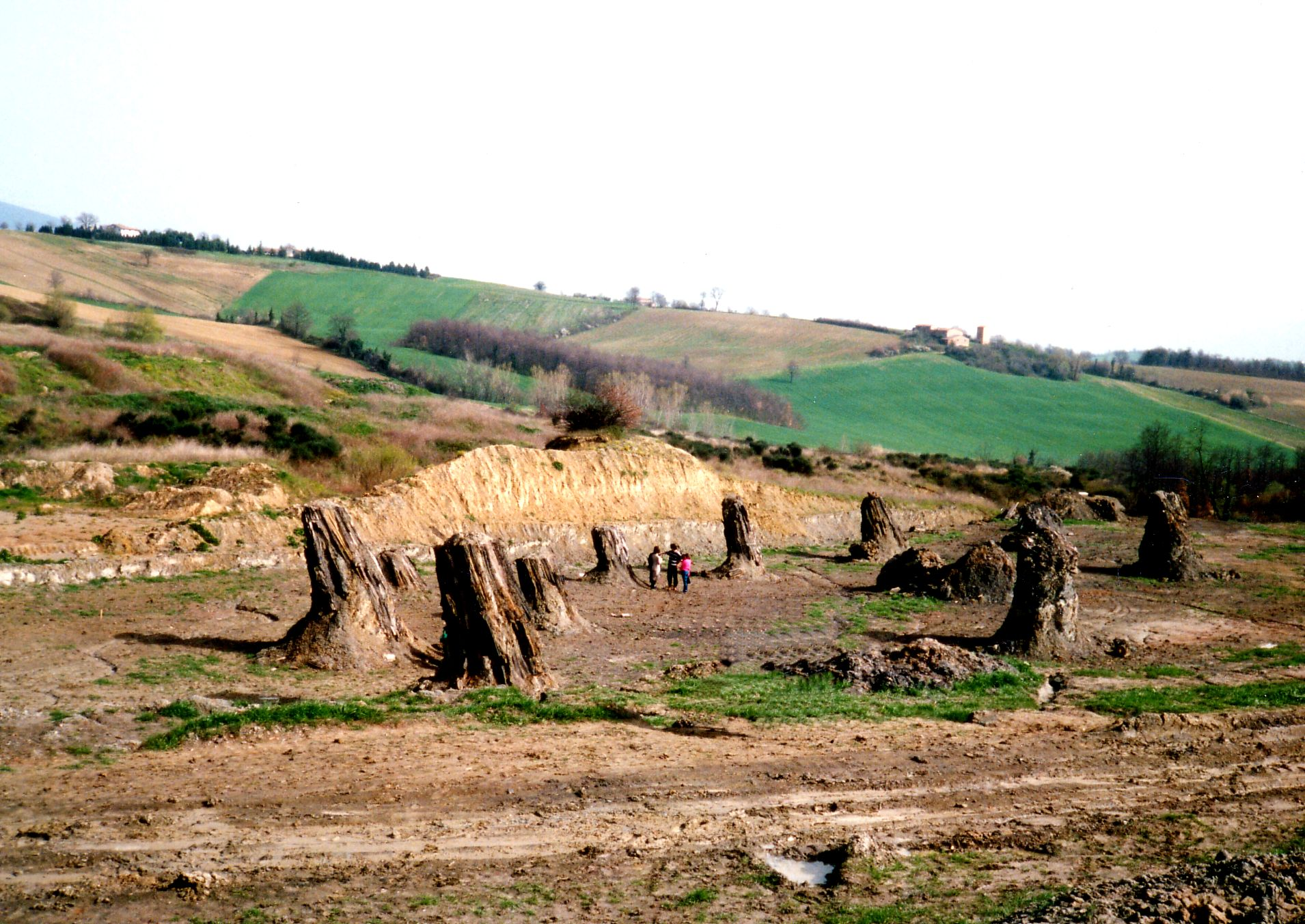 Fossil forest of Dunarobba, Avigliano Umbro, Italy